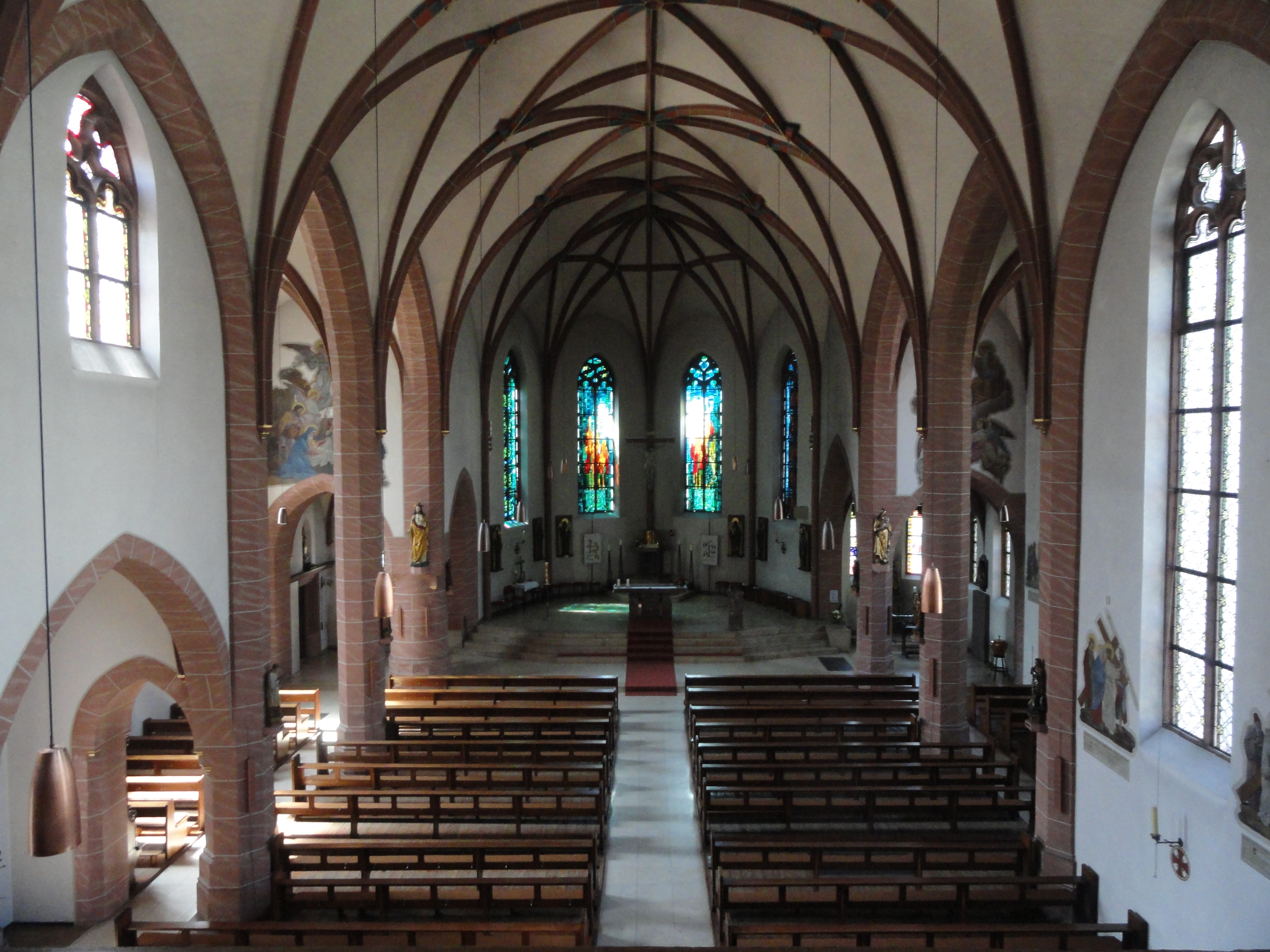 Pfarrkirche Zellhausen Innenraum